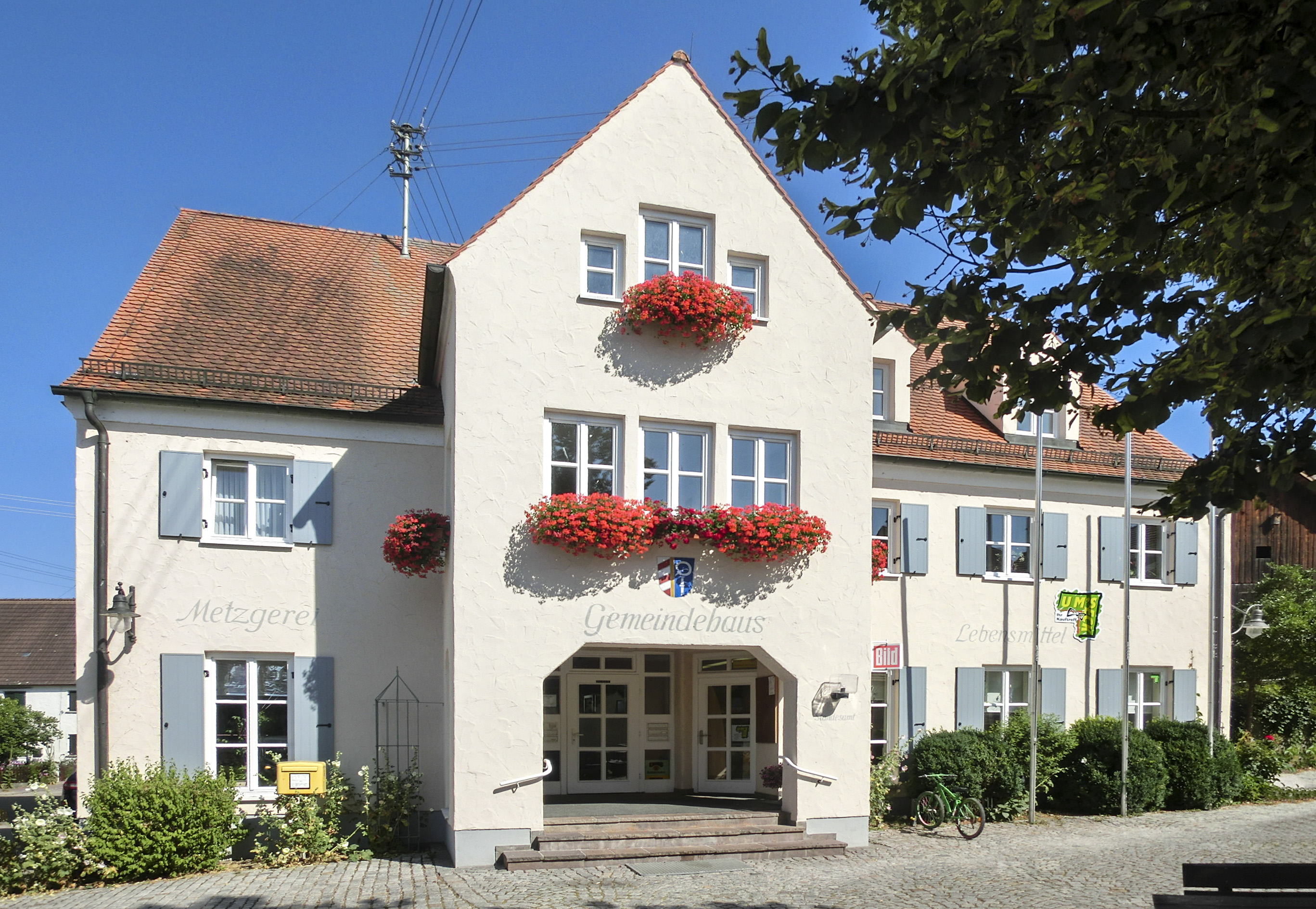 Deutschland - Bayern - Landkreis Günzburg - Ellzee: Gemeindehaus